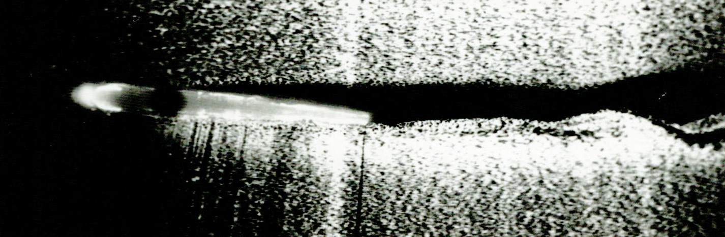 Strömungssichtbarmachung an einem Flügel-Profil mittels Gasbläschen in Wasser